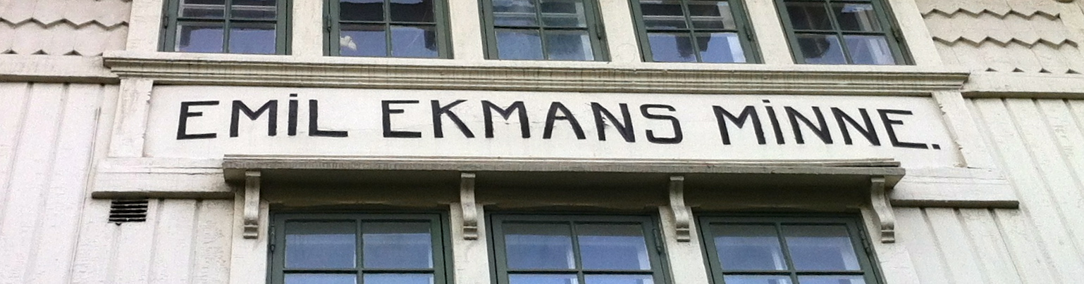 Emil Ekmans minne, Sjömannasällskapet på Sjömansgatan 5 i Olivedal, Göteborg.